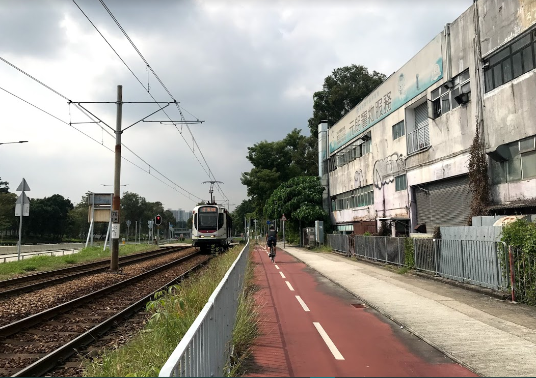 粵語: 呢個係位於元朗區嘅單車徑主幹線